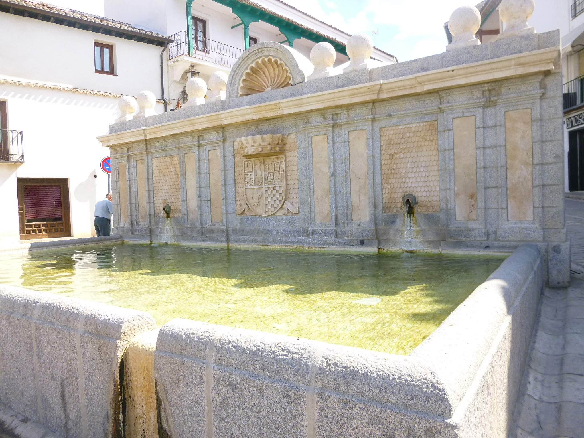 Fuente Arriba, en la Plaza Mayor de Chinchón (Comunidad de Madrid)